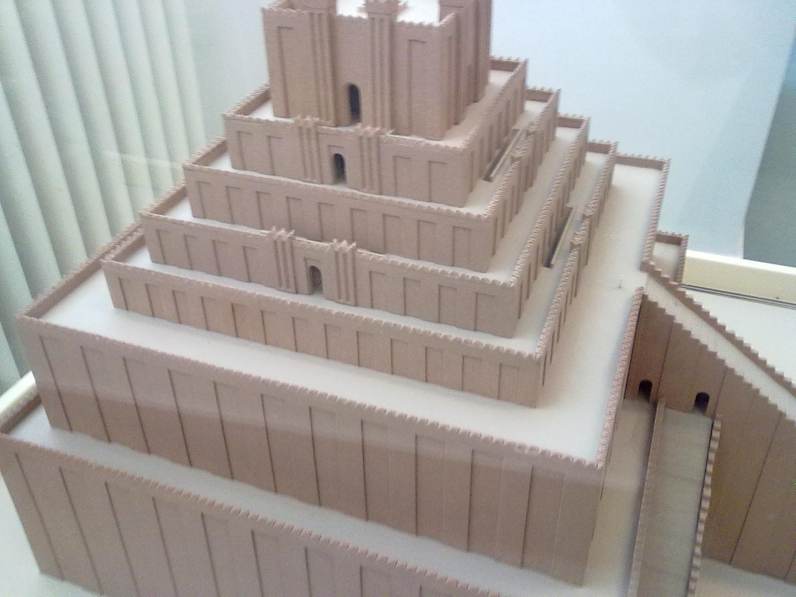 Reconstrucció de la Torre de Babilònia en un museu de Berlín.